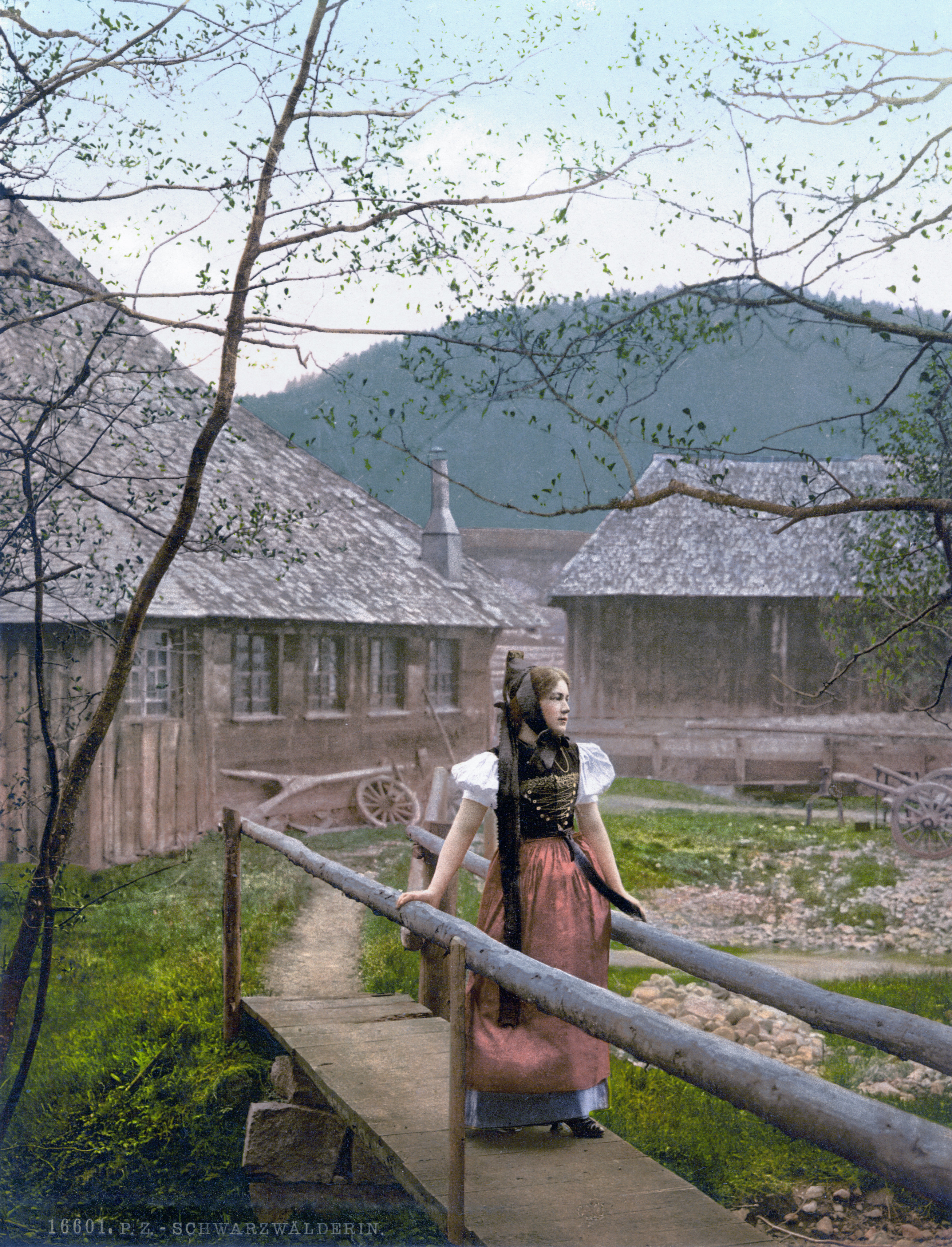 Schwarzwälderin um 1900